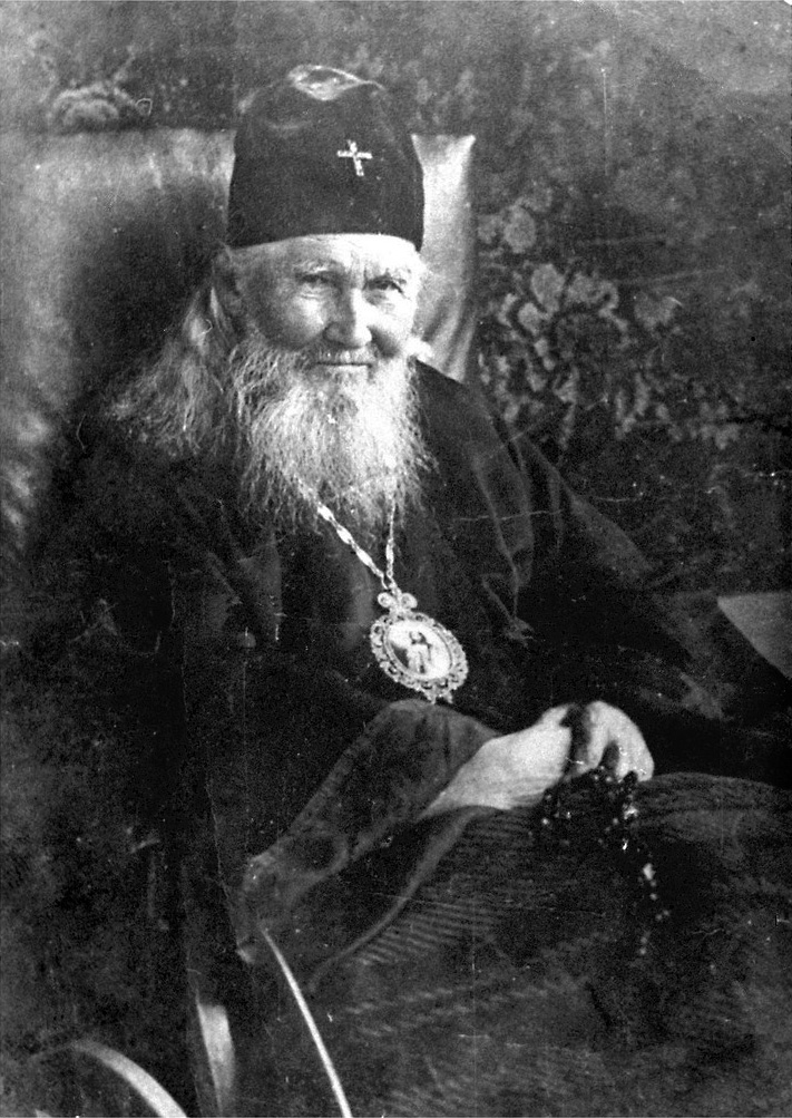 митрополит Макарий (Невский) на покое